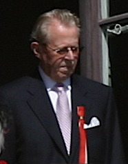 Johan Martin Ferner ved vindauget på Slottet 17. mai 2007